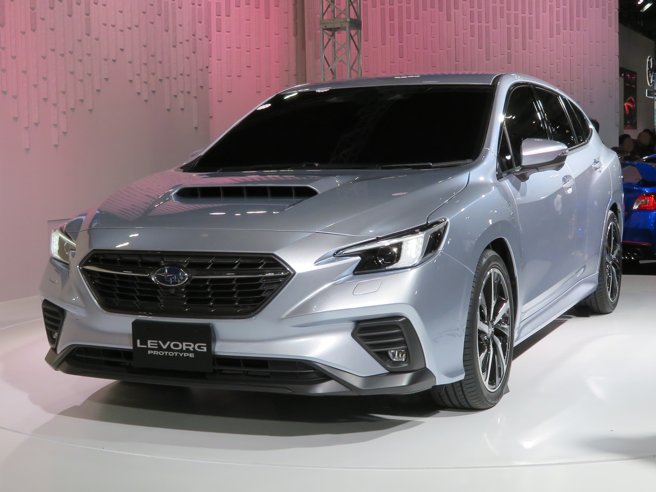 大阪モーターショー2019に於いてスバル・レヴォーグプロトタイプを撮影。